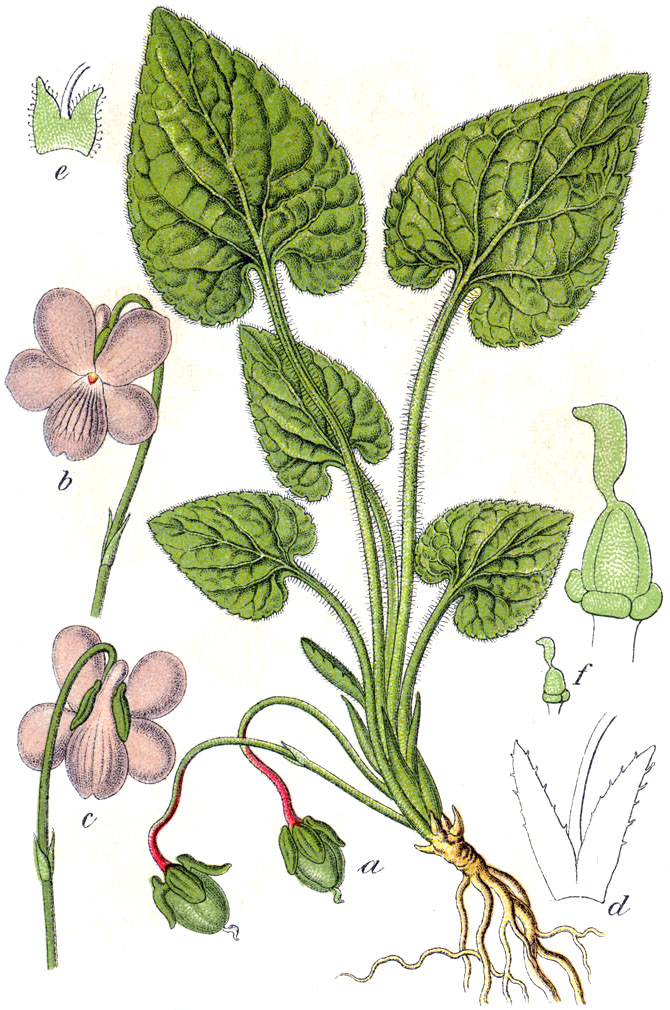 and FloraWeb.de: Viola hirta L. : Viola odorata L., syn. Viola hirta L. Original Caption Rauhhaariges Veilchen, Viola hirta